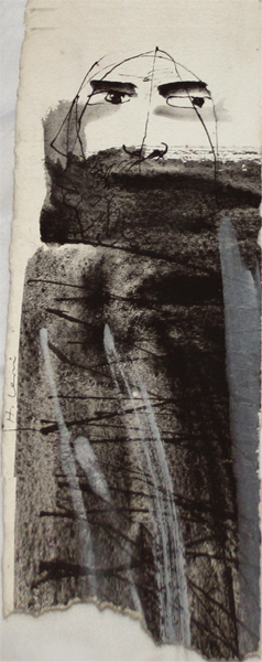 Zufälliges Selbstportrait. Tusche. 1983